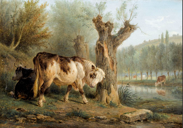 Flusslandschaft mit Stieren, Öl auf Leinwand, 32,5x46 c